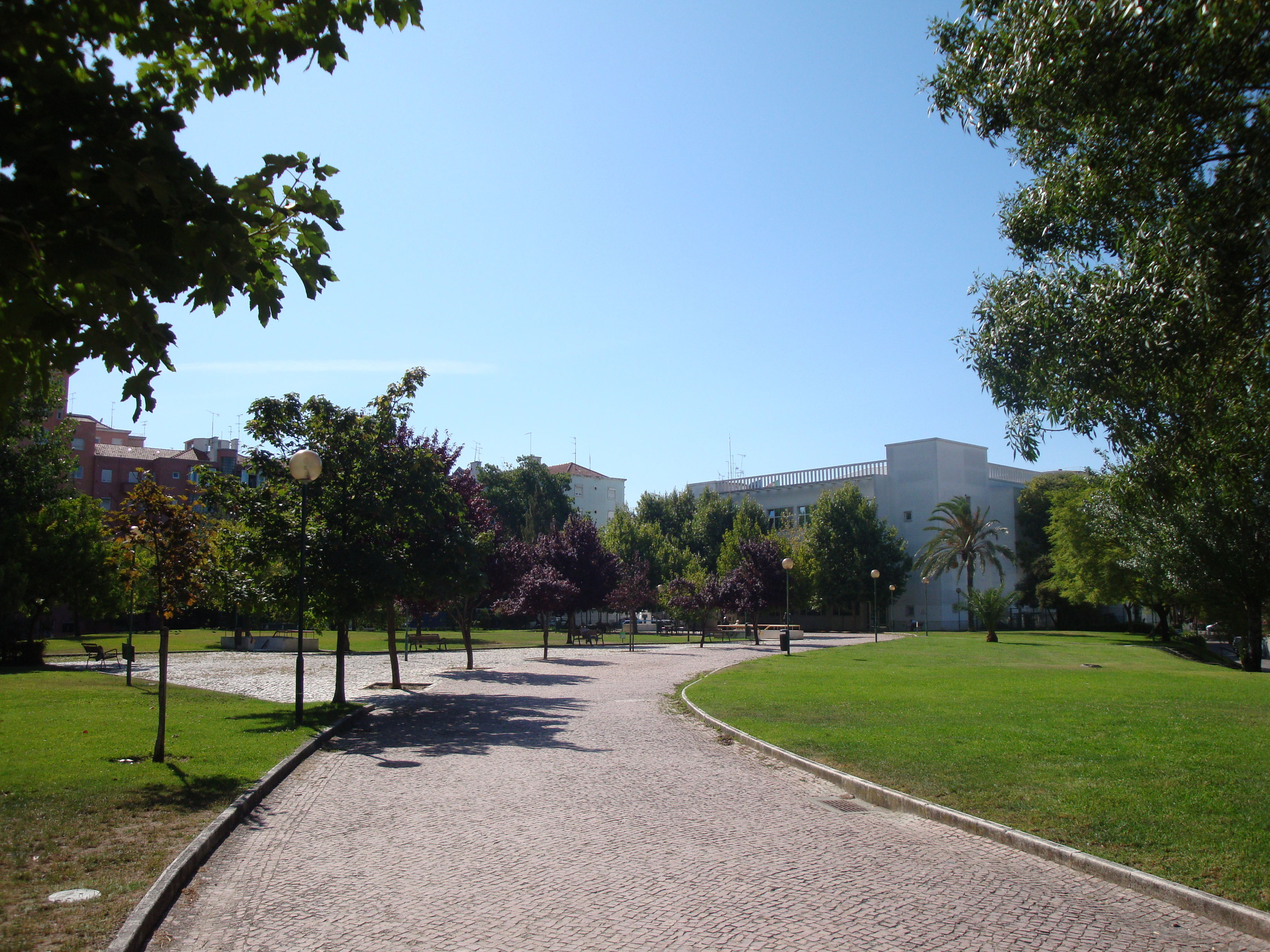 Jardim Fernando Pessa - Lisboa